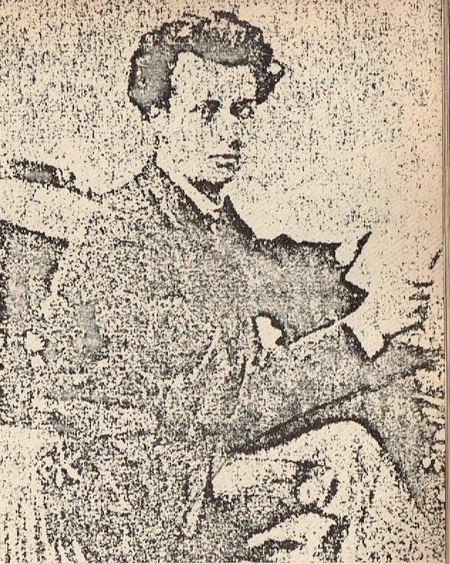 Ioan Cehan Yanko von Racowitza